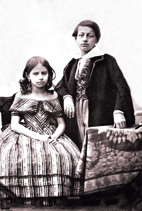 Елена и Миша Волконские - дети декабриста С.Г. Волконского. Дагерротип А. Давиньона. Иркутск. 1845 г.